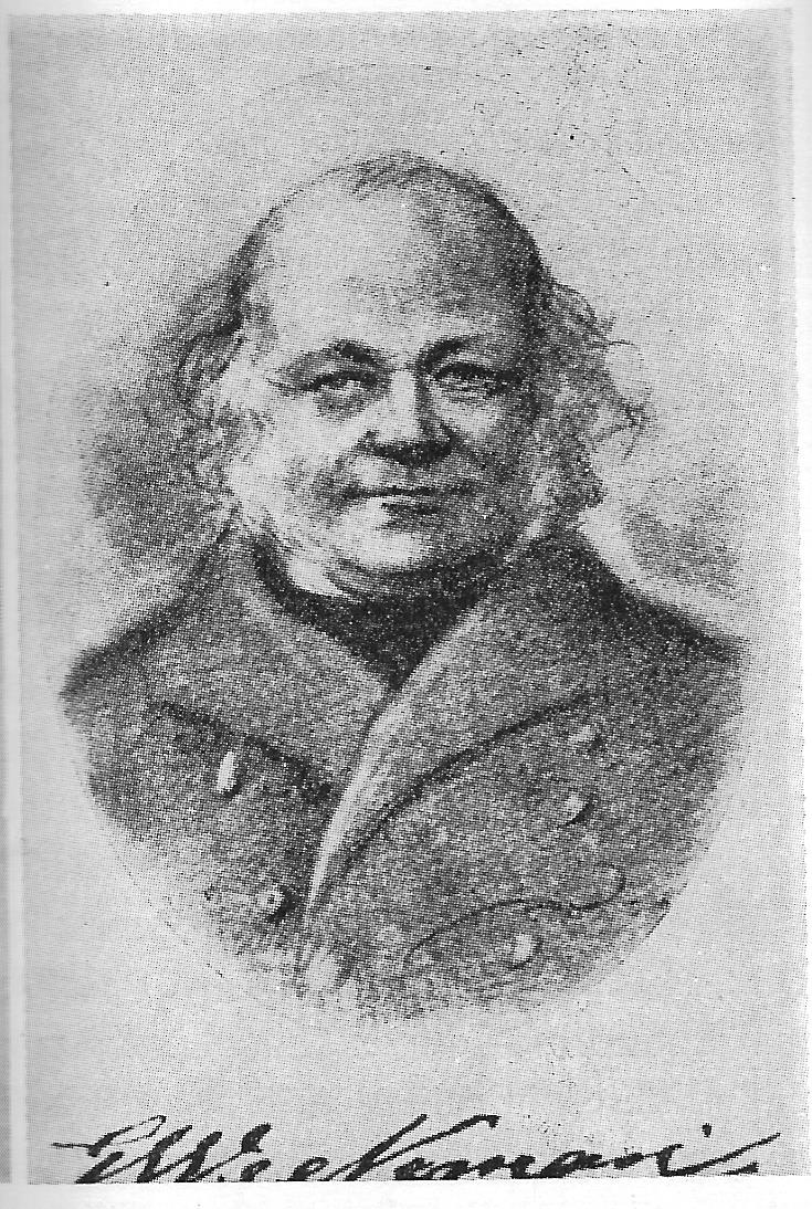 Jyväskyläläinen kultaseppä Gustaf Weckman (1800-1868)